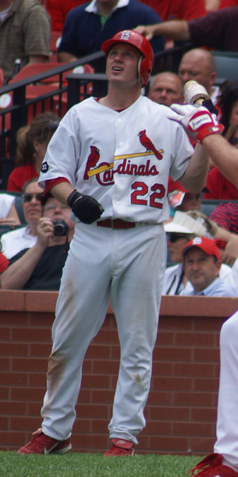 David Eckstein